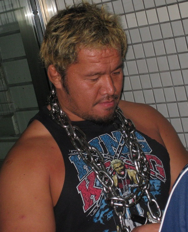 2010年12月11日 大阪府立体育会館 真壁刀義